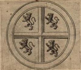 Marie of Brabant (1278–1338)